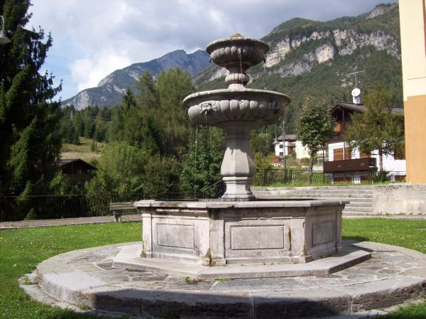 Forni di Sotto (UD - Friuli-Venezia Giulia - Italy), una delle tre fontane ottocentesche